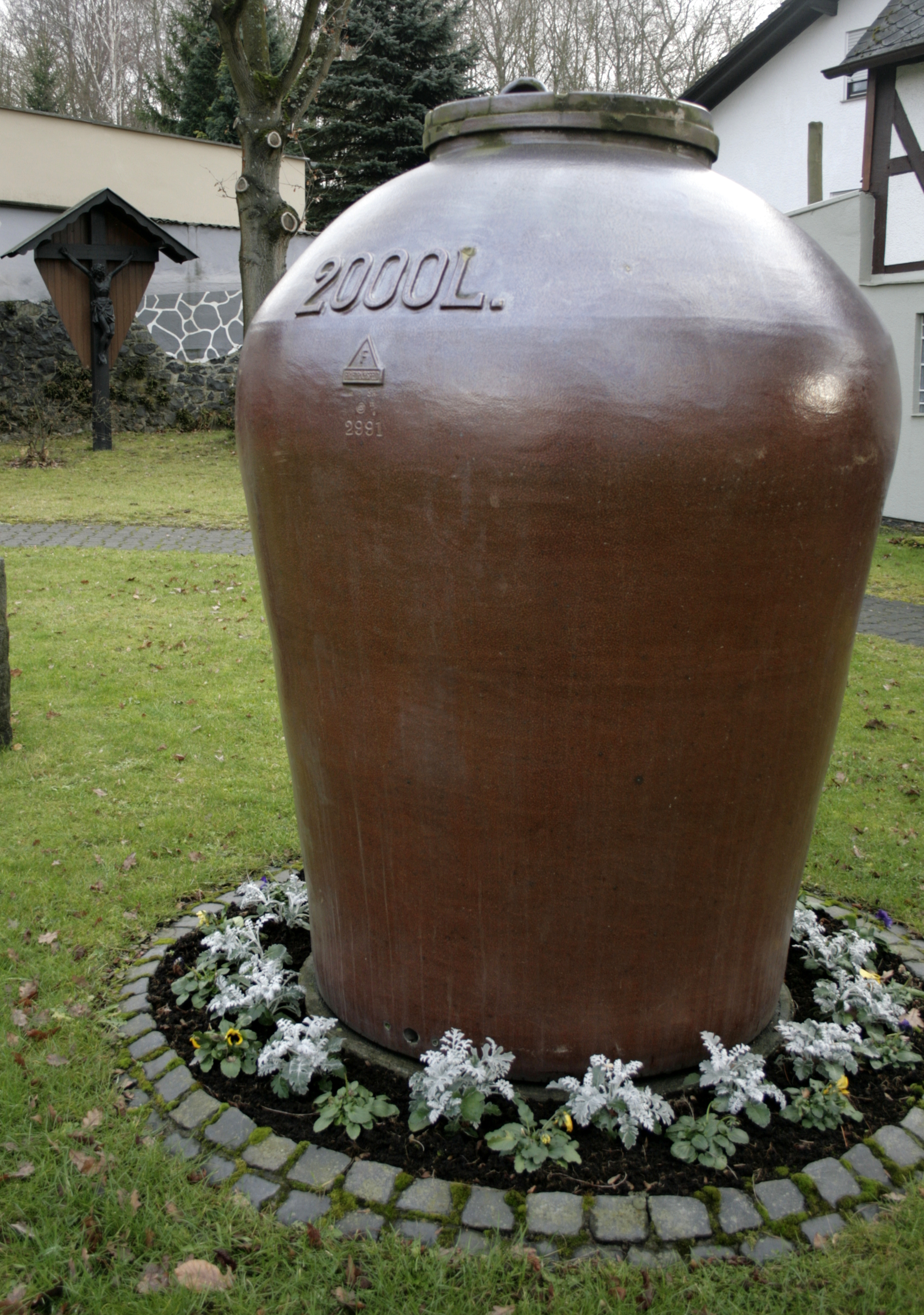 Denkmal in Dornburg-Thalheim, Deutschland